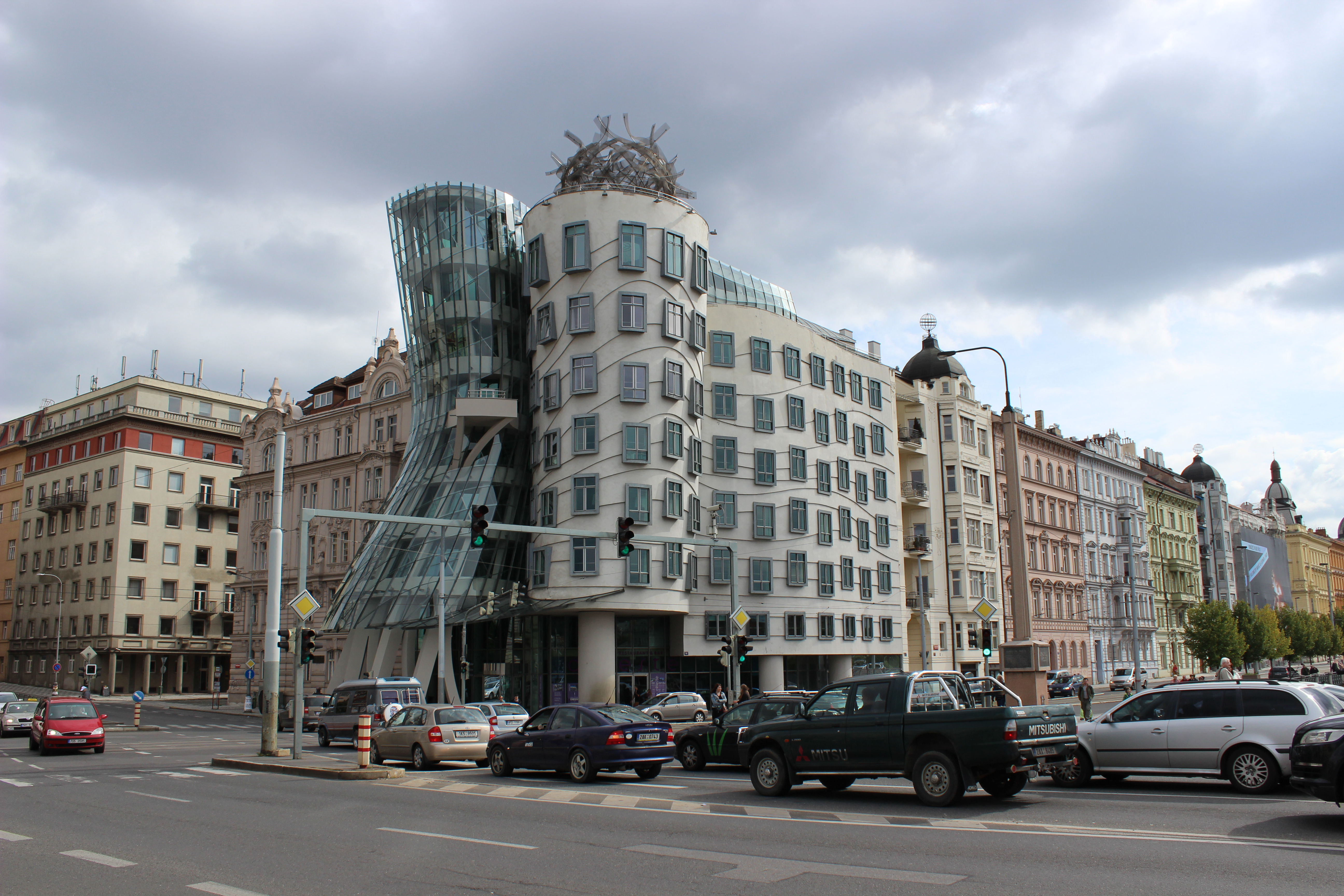 Pražský Tančící dům na Rašínově nábřeží.